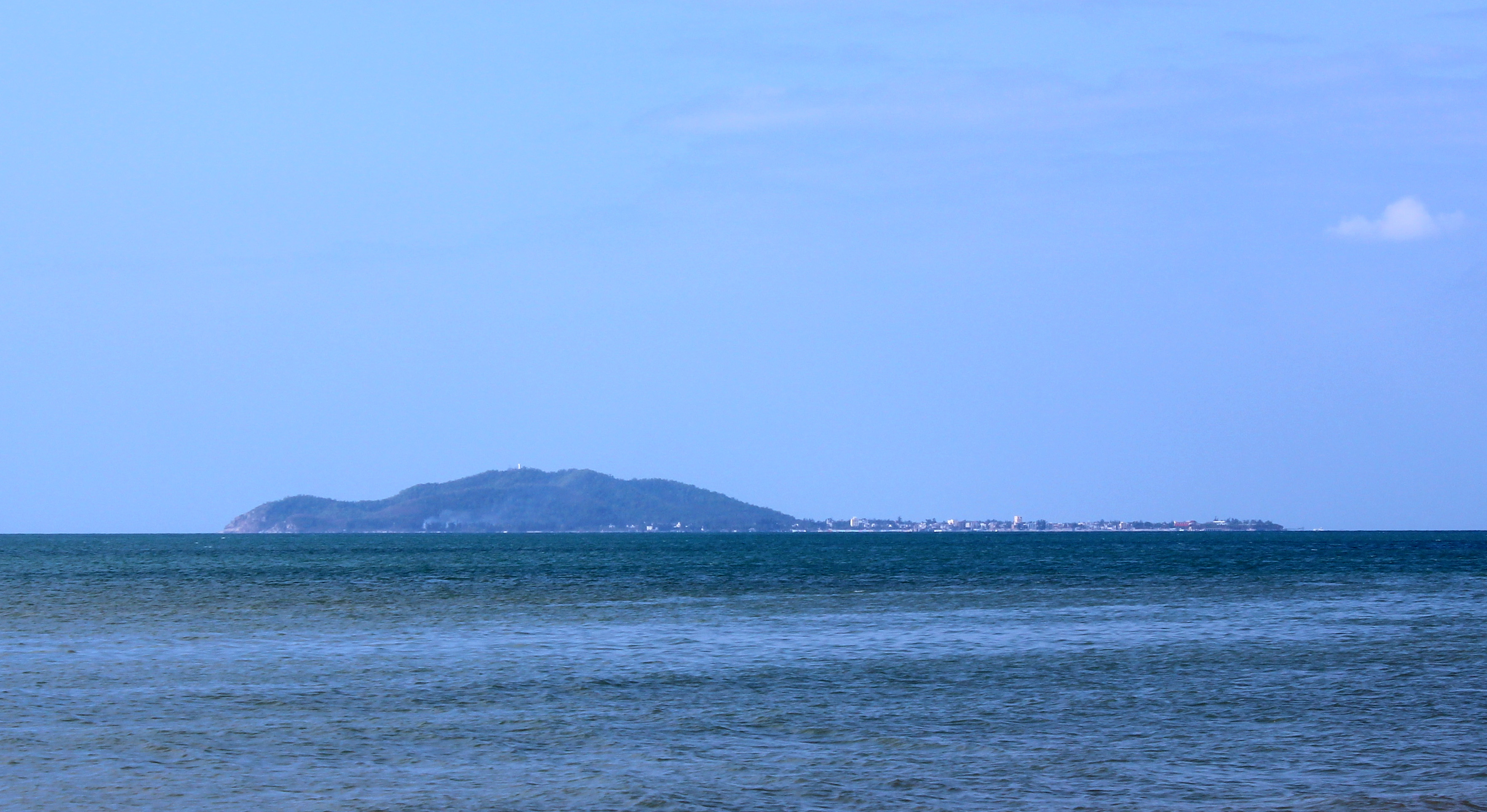 海南三亚湾中的西瑁洲。